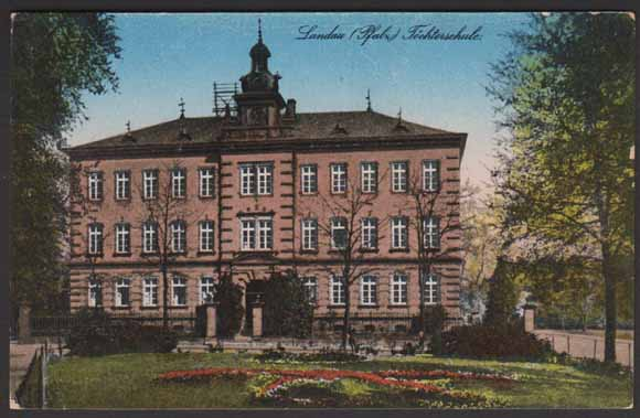 Die Höhere Töchterschule in Landau in der Pfalz ca. 1890; das heutige Max-Slevogt-Gymnasium